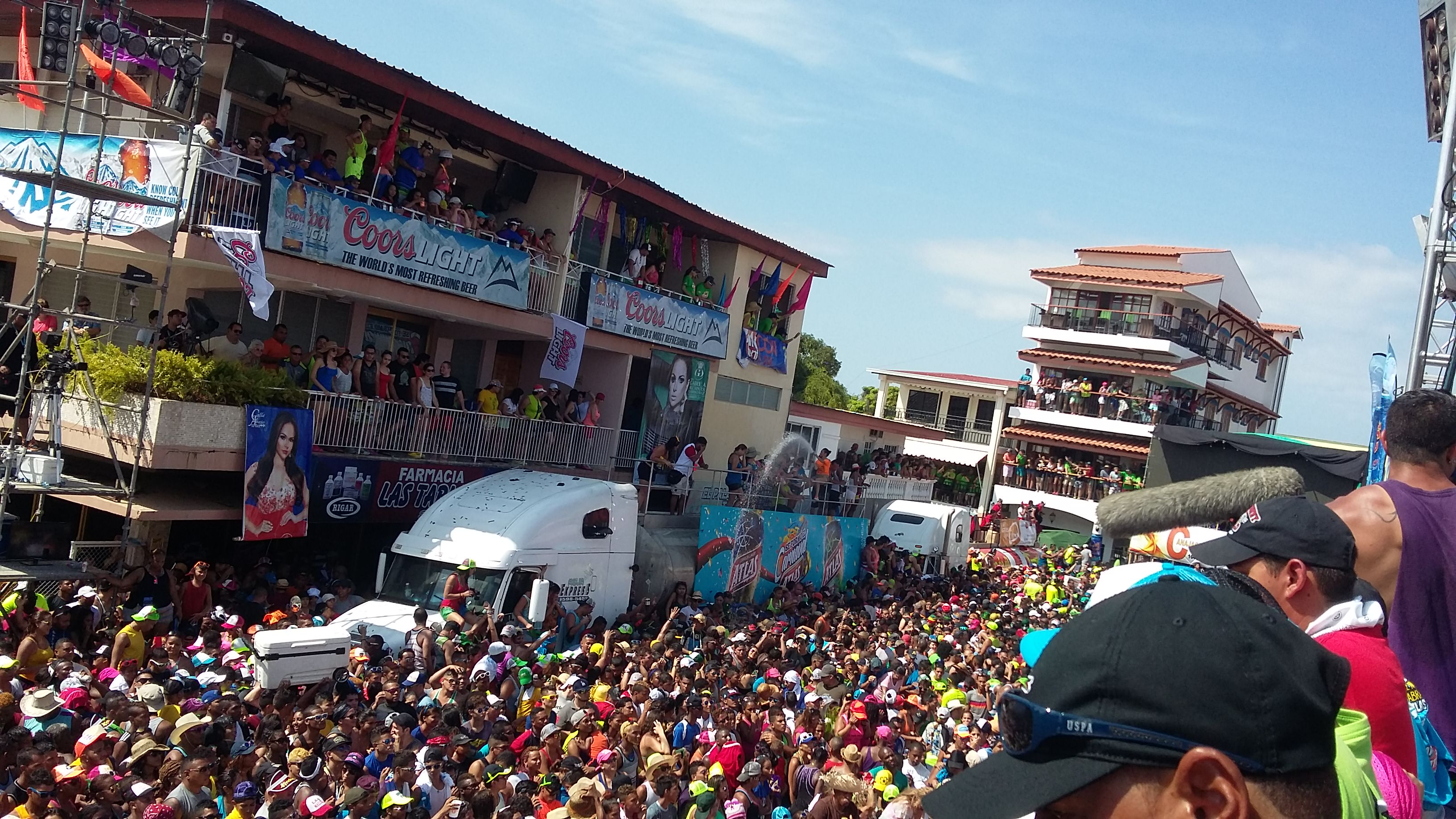 Fotografía de Domingo de Carnava 2015. Vista generada hacia el área de Calle Abajo